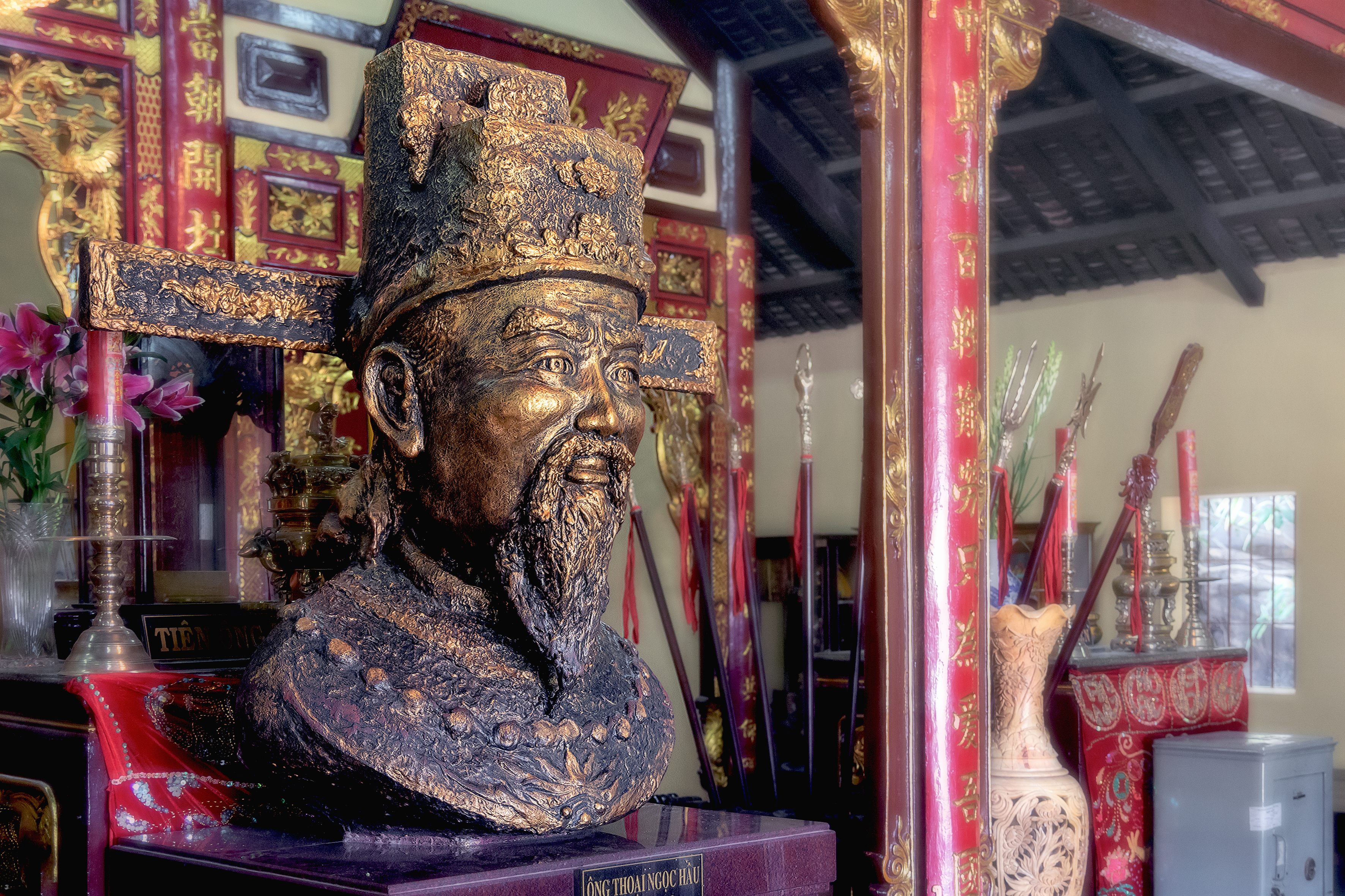 Tượng Thoại Ngọc Hầu trong đền thờ tại Sơn lăng, thuộc phường Núi Sam, TP. Châu Đốc, An Giang, Việt Nam.